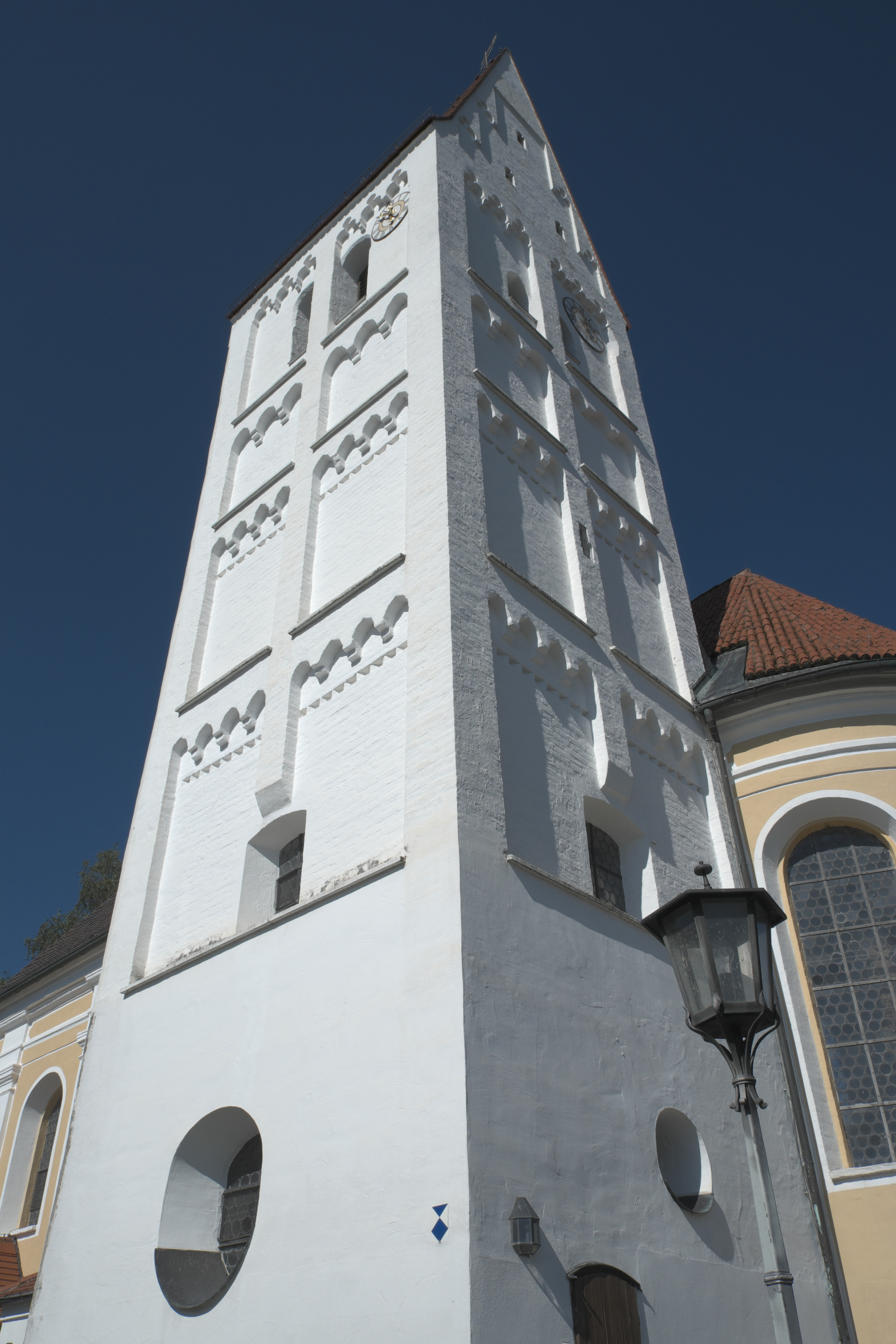 Katholische Pfarrkirche Mariä Himmelfahrt in Epfenhausen (Penzing) im Landkreis Landsberg am Lech (Bayern/Deutschland)